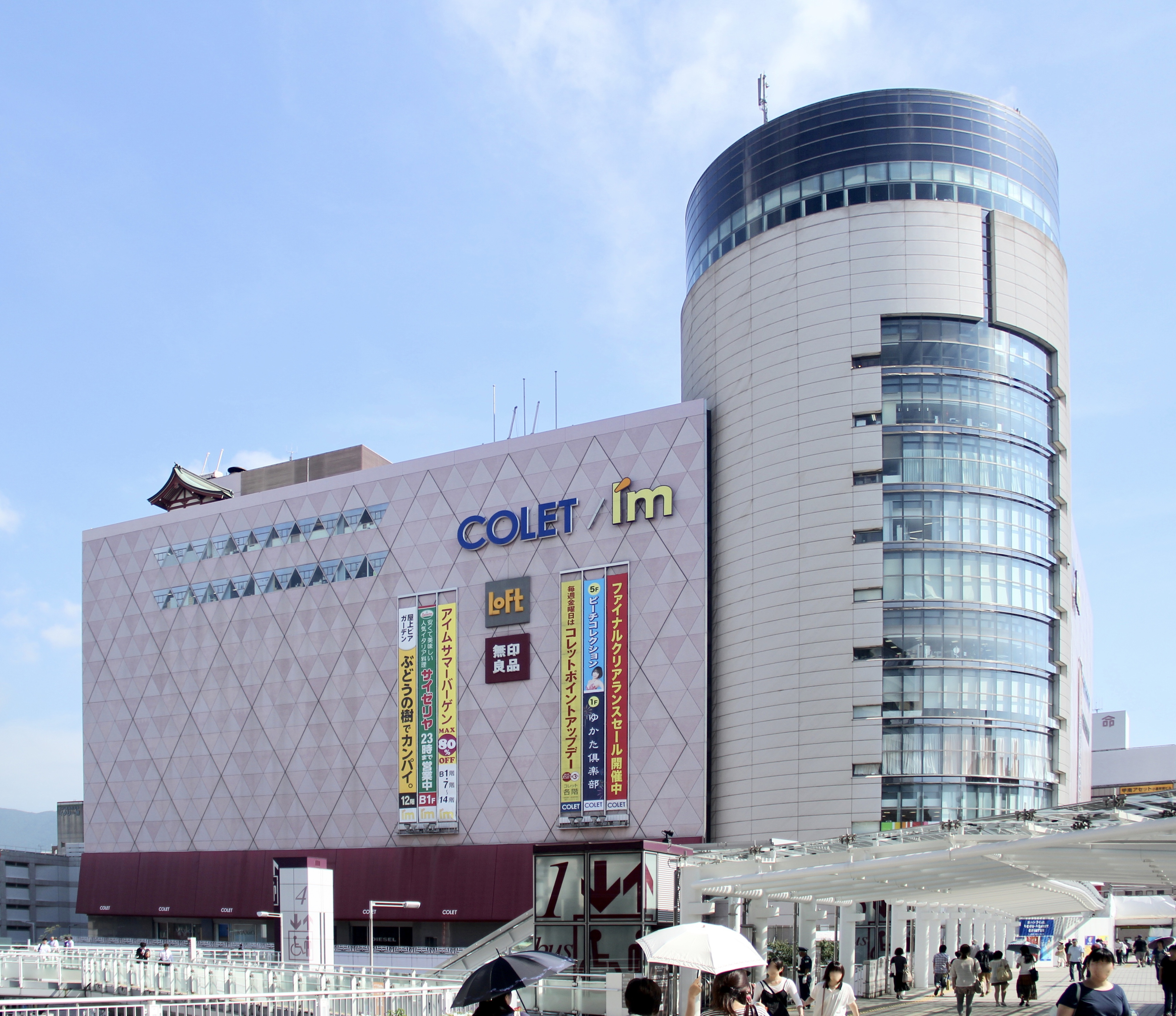 コレット・小倉駅前アイム（セントシティ北九州ビル）Canon EOS 60D